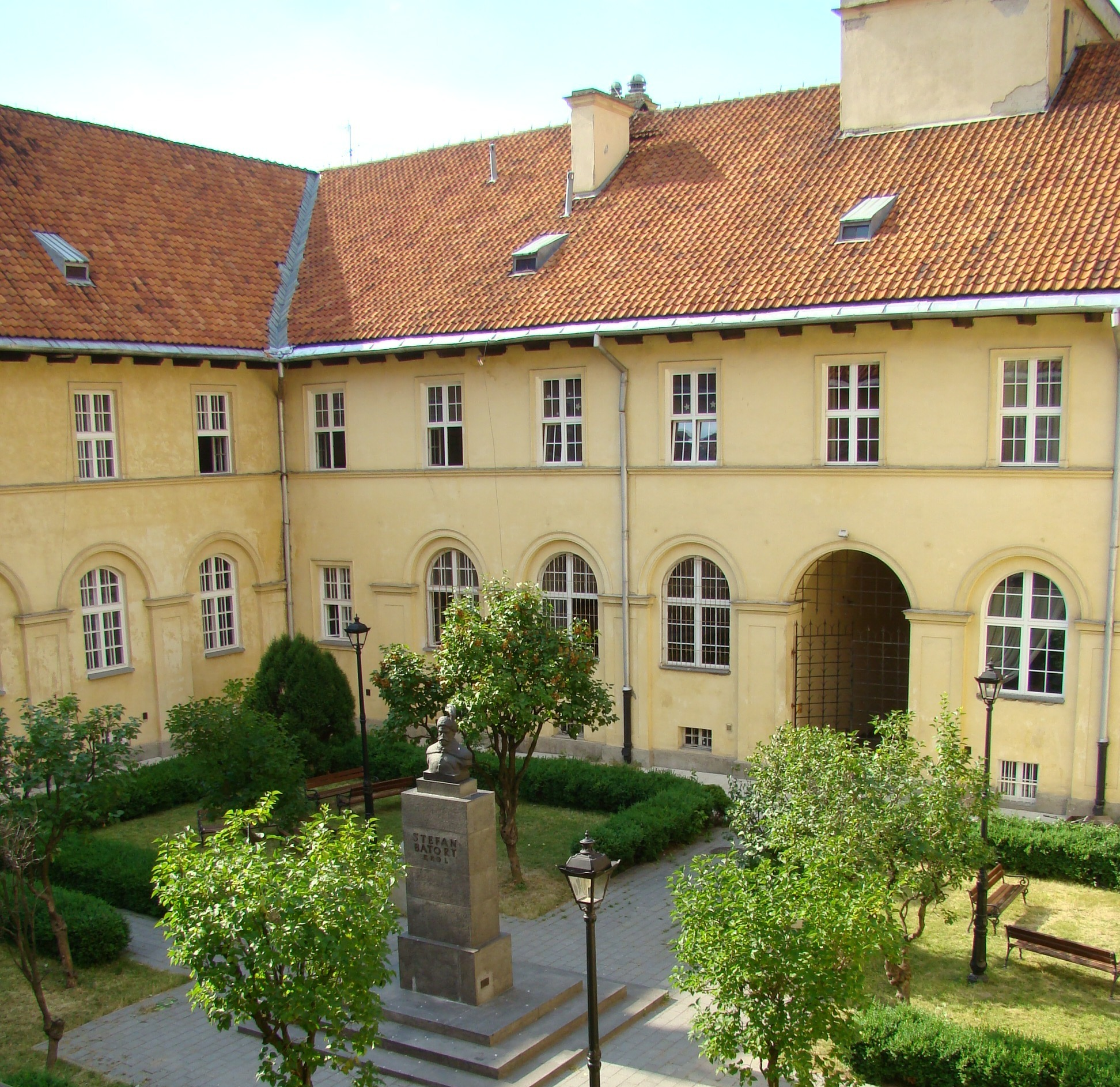 Dziedziniec wewnętrzny Gimnazjum i Liceum im. Stefana Batorego